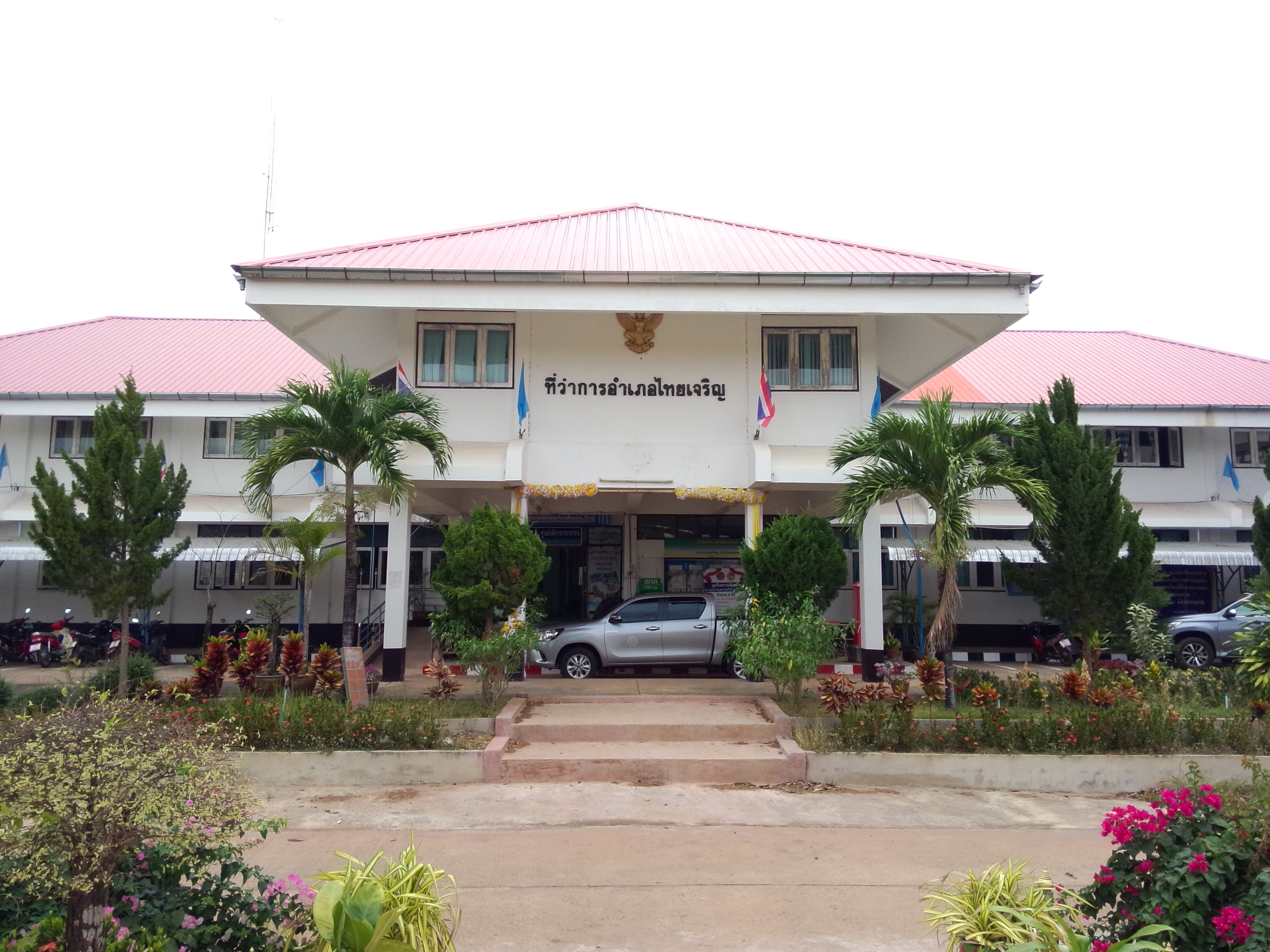 ที่ว่าการอำเภอไทยเจริญ